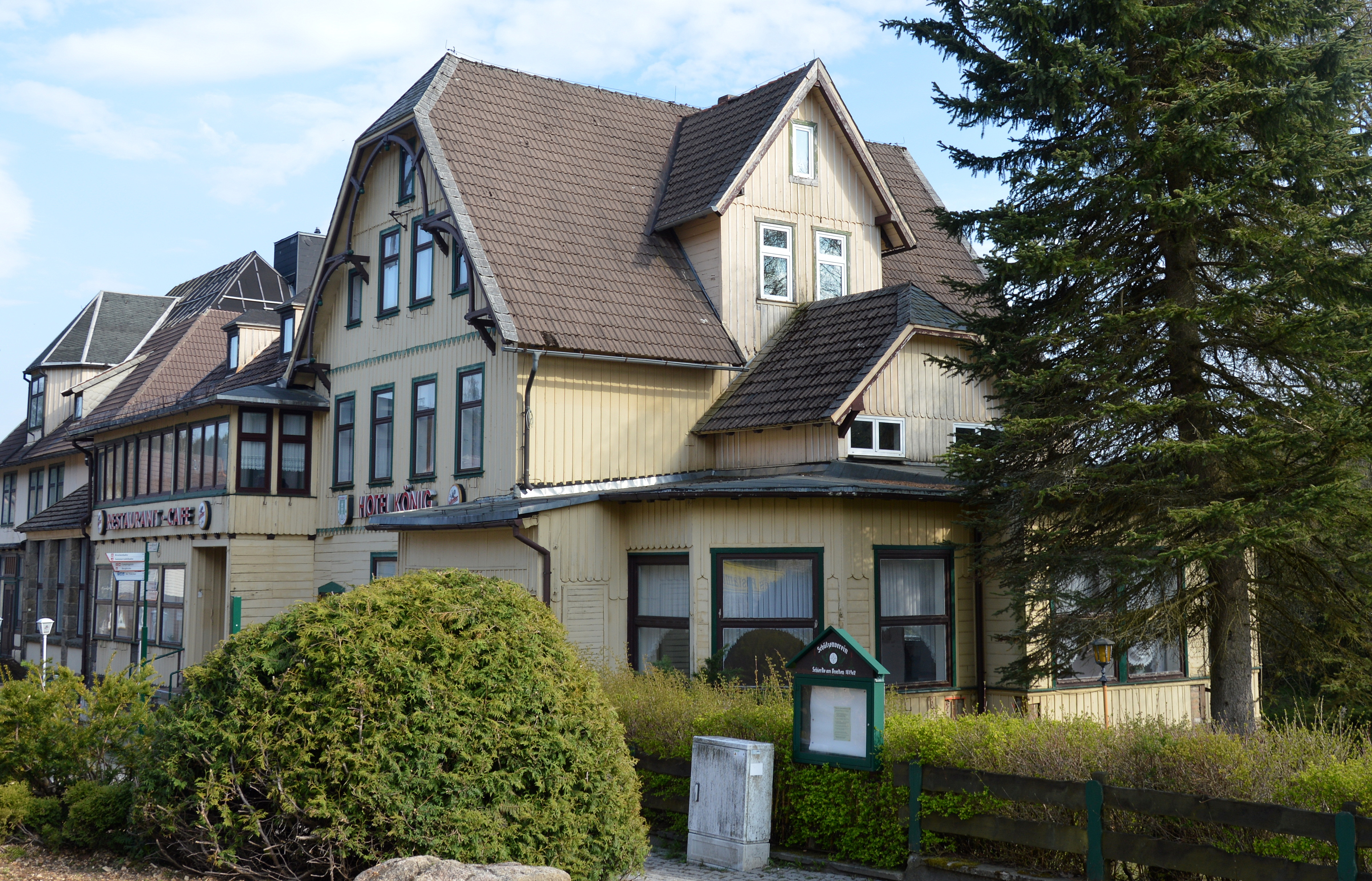 Kirchberg 15 in Schierke